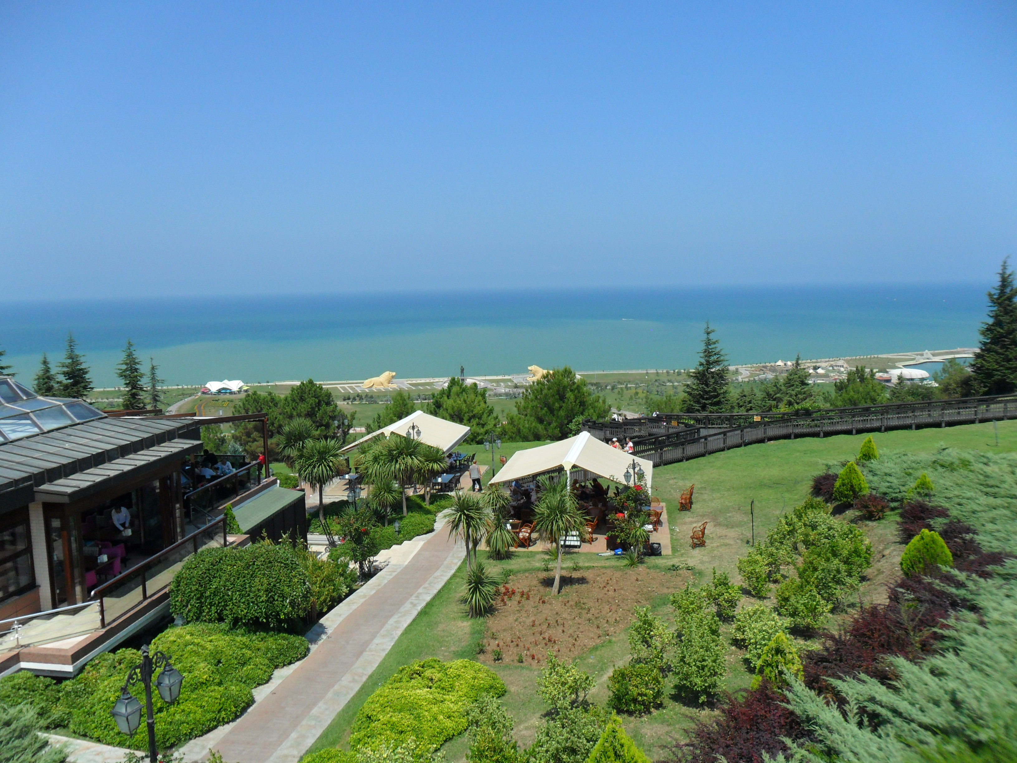 Amisos Tepesi'nden çekilen bir fotoğraf.